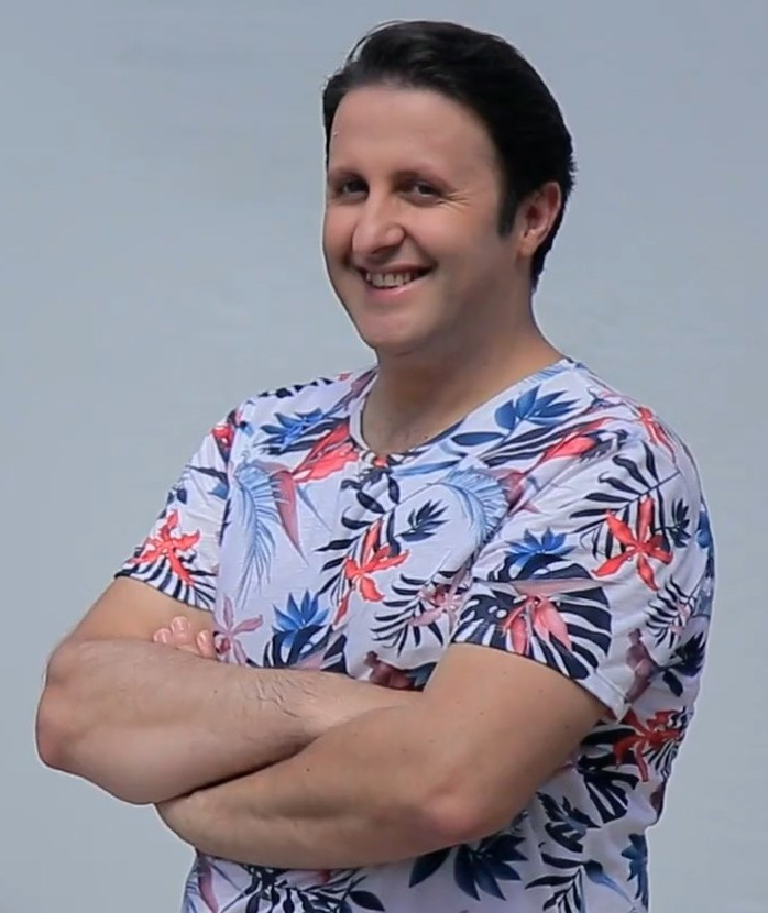 İlker Ayrık'ın da oynadağı Akbank Mobil Yatırım Hizmetleri reklamından bir kare